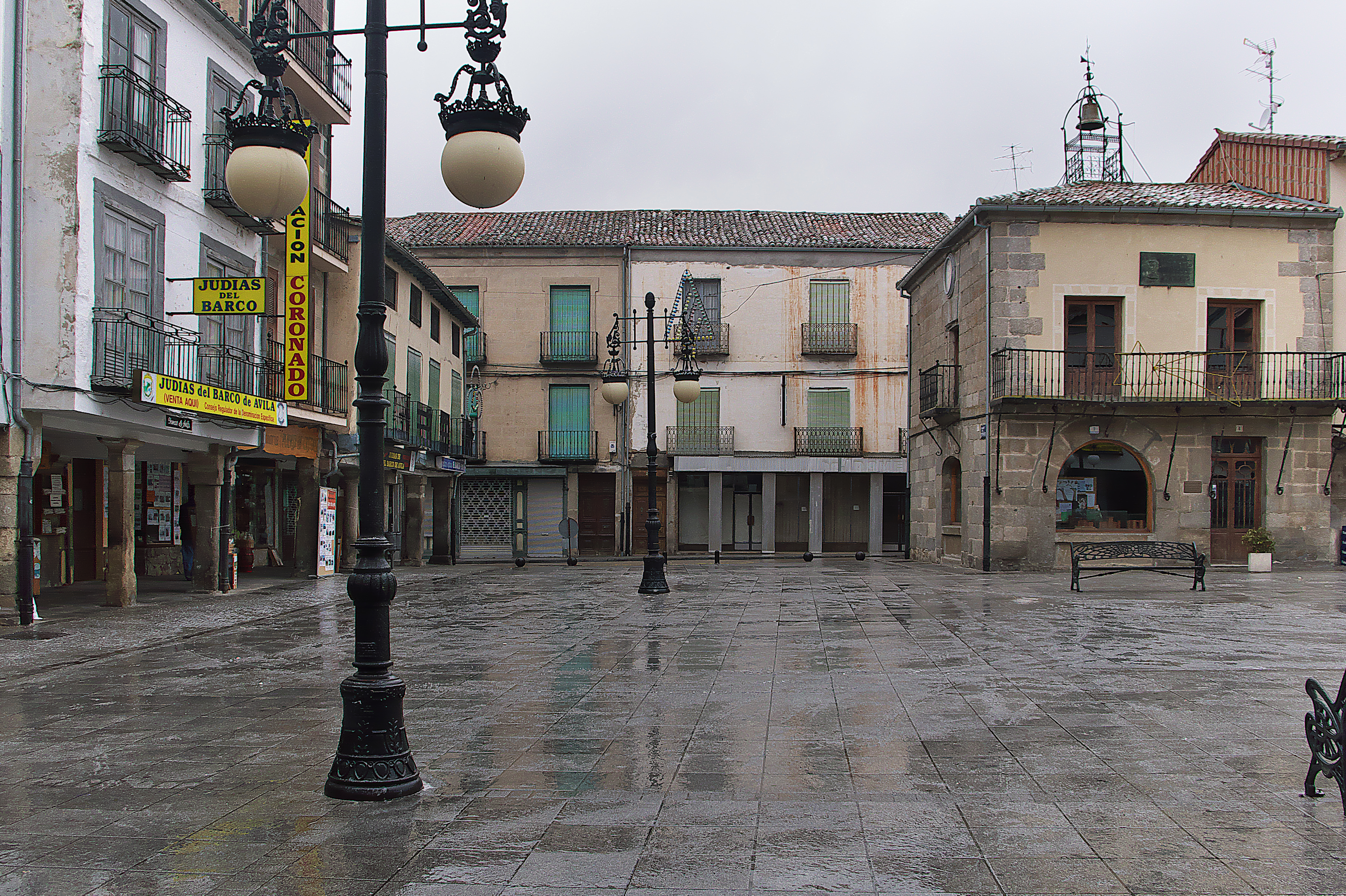 La Casa del Reloj, antigua Casa Consistorial